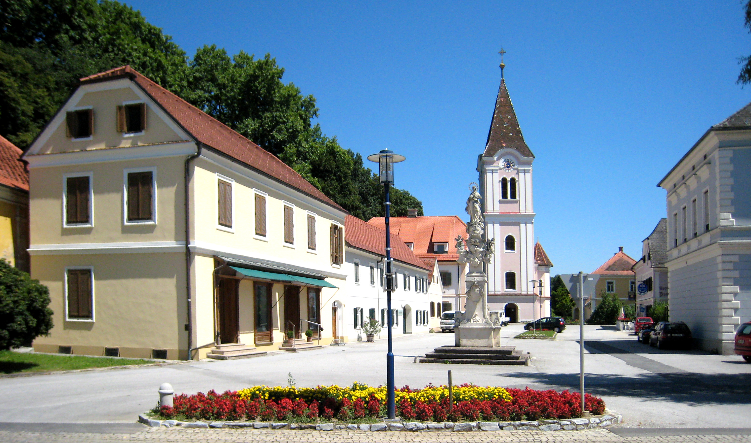 Mariensäule